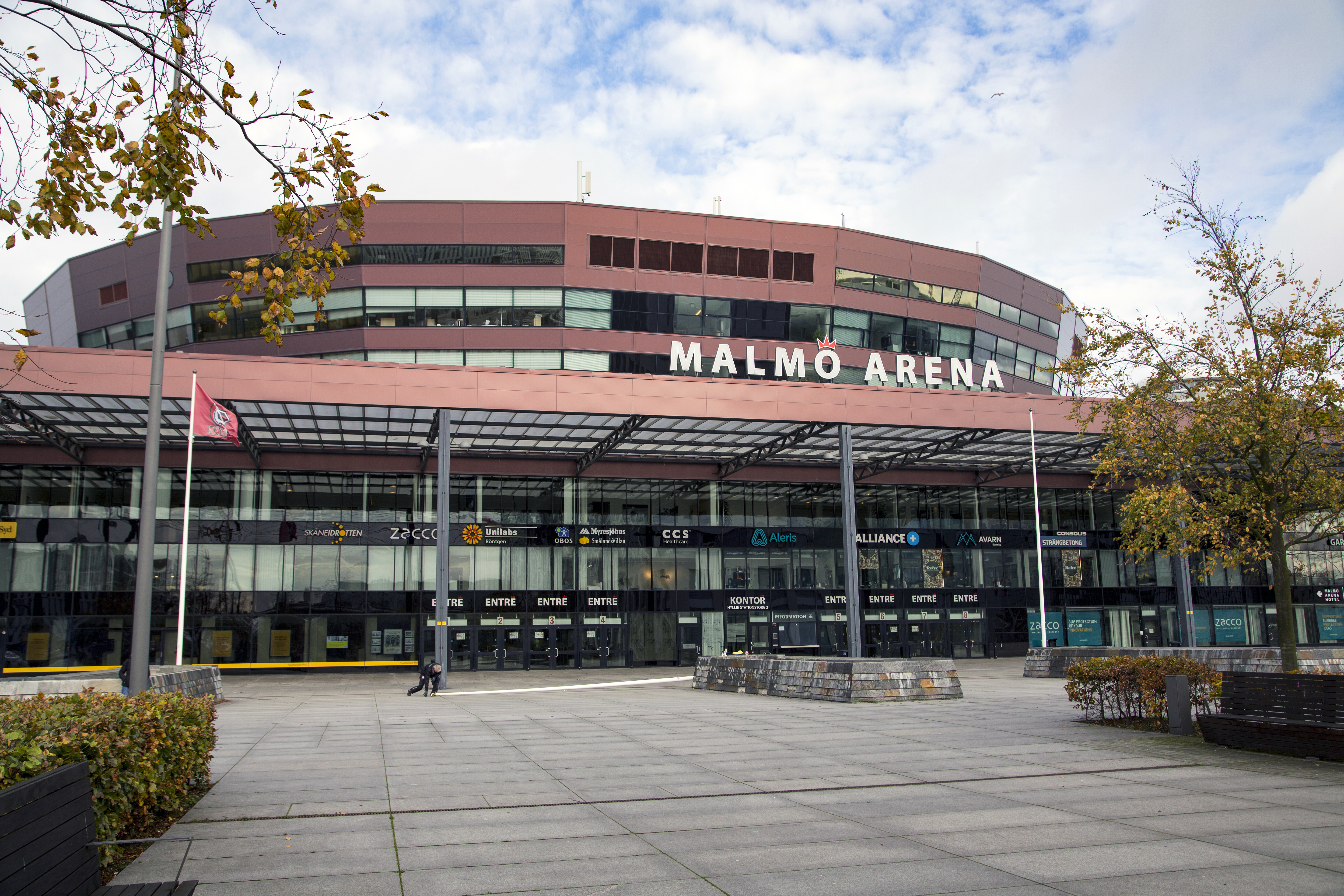 Malmö Arena i Hyllie..Photo: News Øresund - Johan Wessman.© News Øresund - Johan Wessman (CC BY 3.0).. .Detta verk av News Øresund är licensierat under en Creative Commons Erkännande 3.0 Unported-licens (CC BY 3.0). Bilden får fritt publiceras under förutsättning att källa anges. .The picture can be used freely under the prerequisite that the source is given. News Øresund, Malmö, Sweden.News Øresund är en oberoende regional nyhetsbyrå som är en del av det oberoende dansk-svenska kunskapscentrat Øresundsinstituttet...